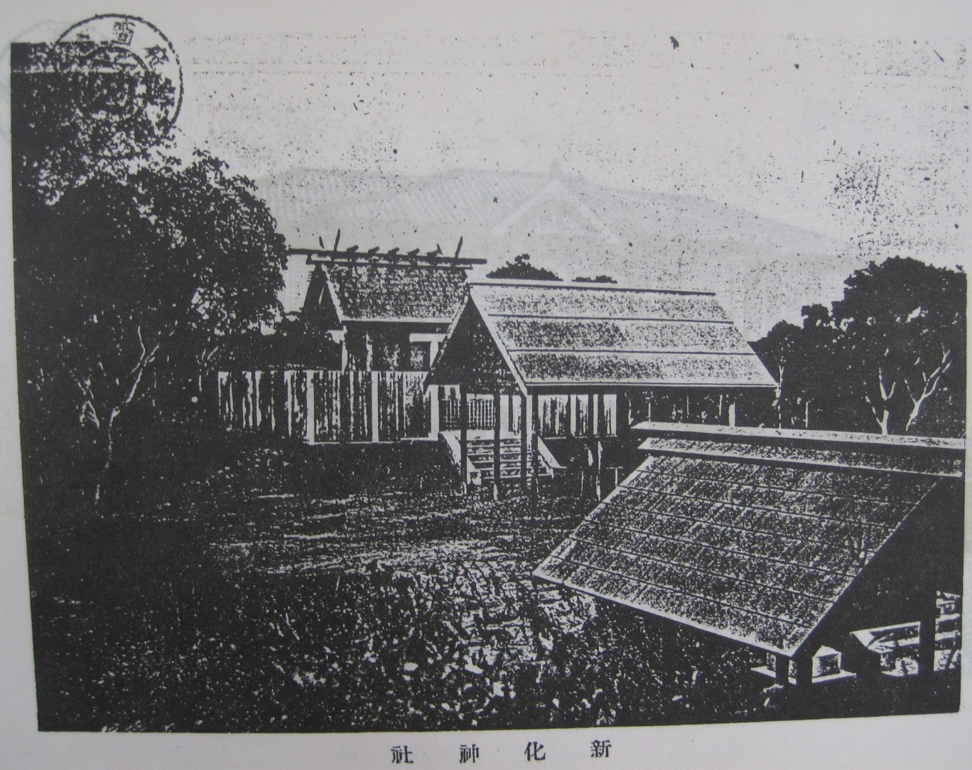 新化神社，翻拍自1929年版的《新化郡概況》。圖片中上有書頁背面透過來的新化郡役所圖像。